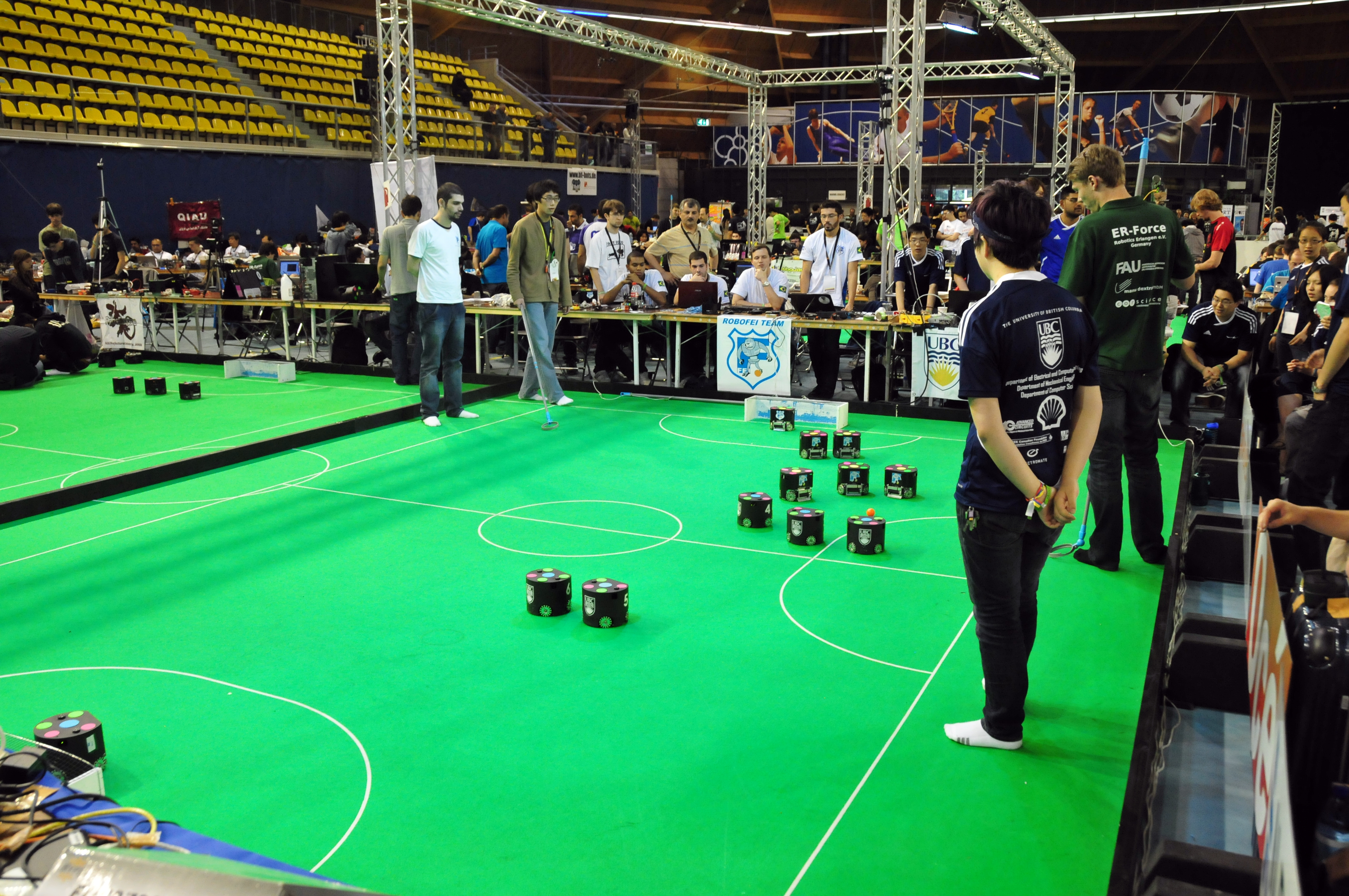 Eindhoven, Niederlande, Robocup 2013